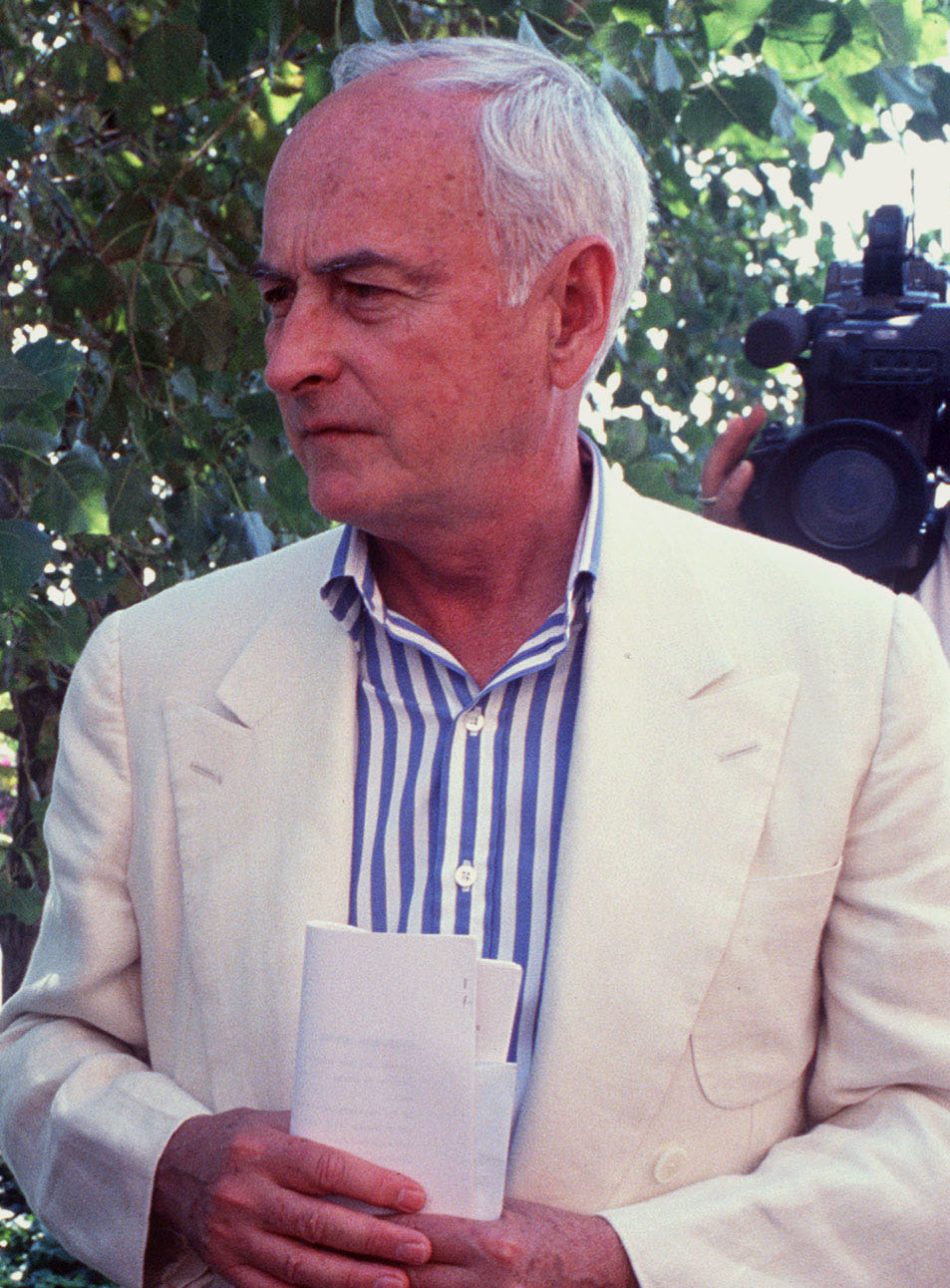 Il regista Alberto Lattuada con James Ivory alla Mostra del cinema di Venezia del 1991